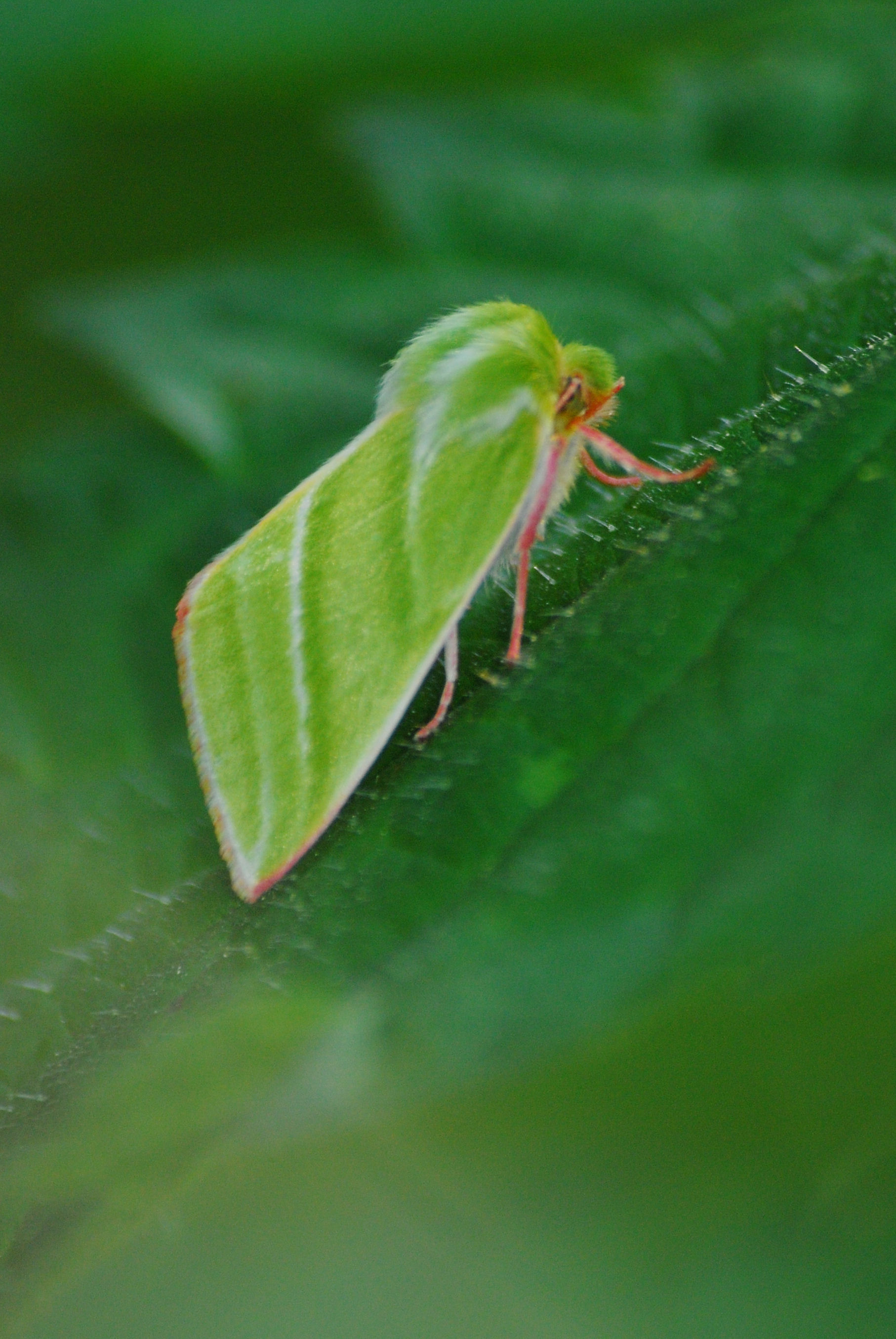 Pseudoips prasinana pl: Zielonka ukośnica